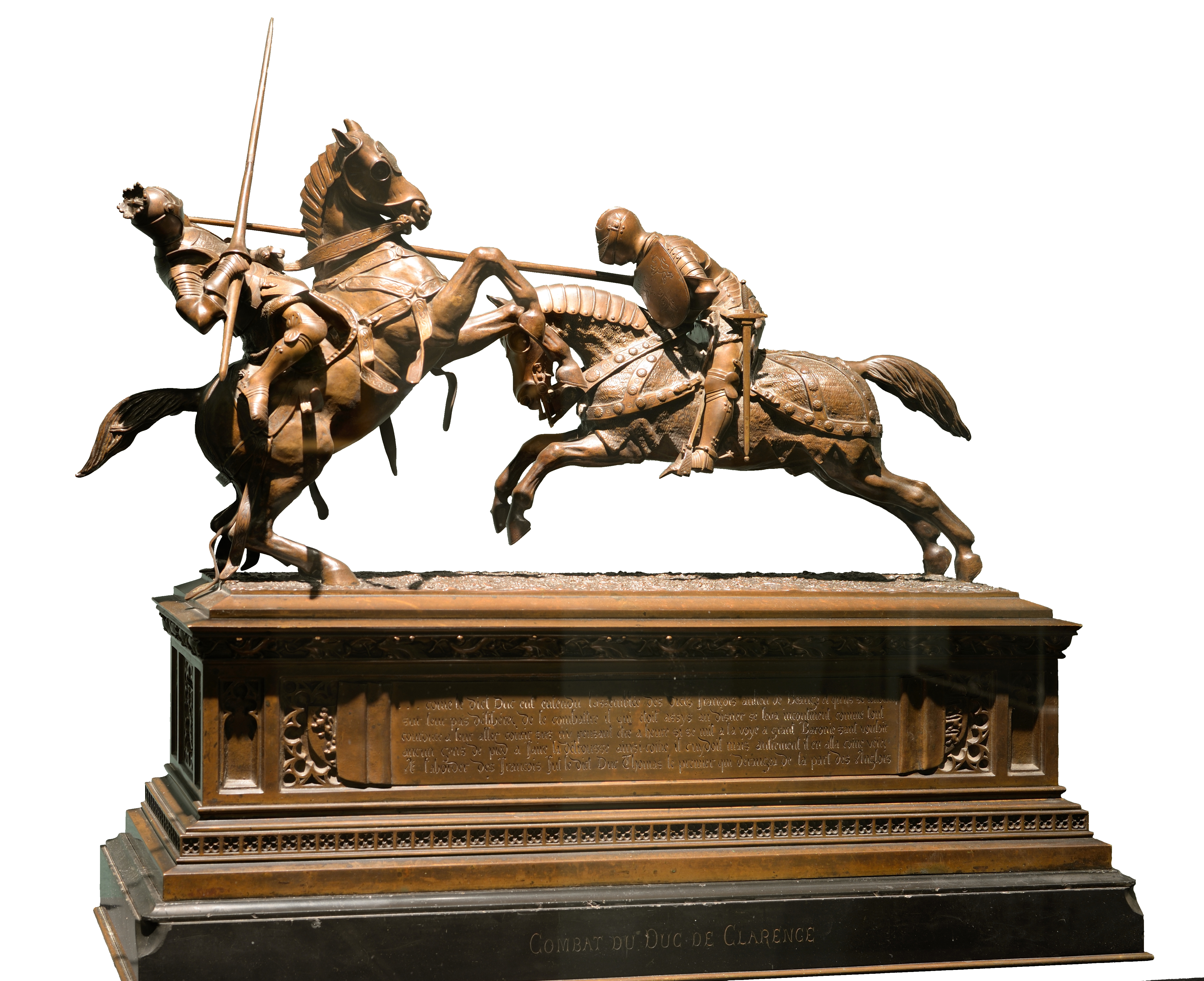 Le Combat du duc de Clarence, sculpture d'Émilien de Nieuwerkerke en 1839, exposé au Musée des beaux-arts de Lyon en 2014.